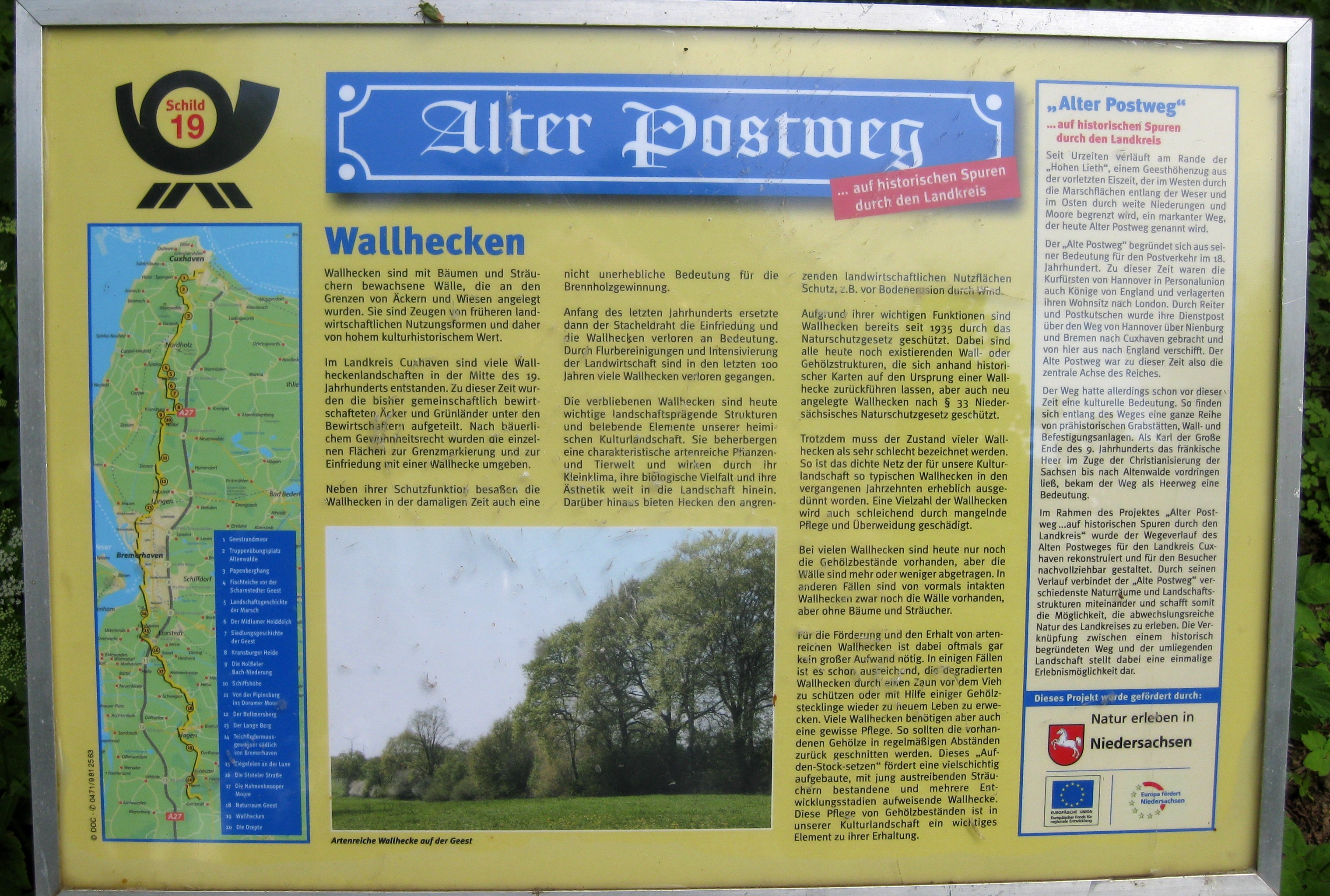 Alter Postweg im LK Cuxhaven